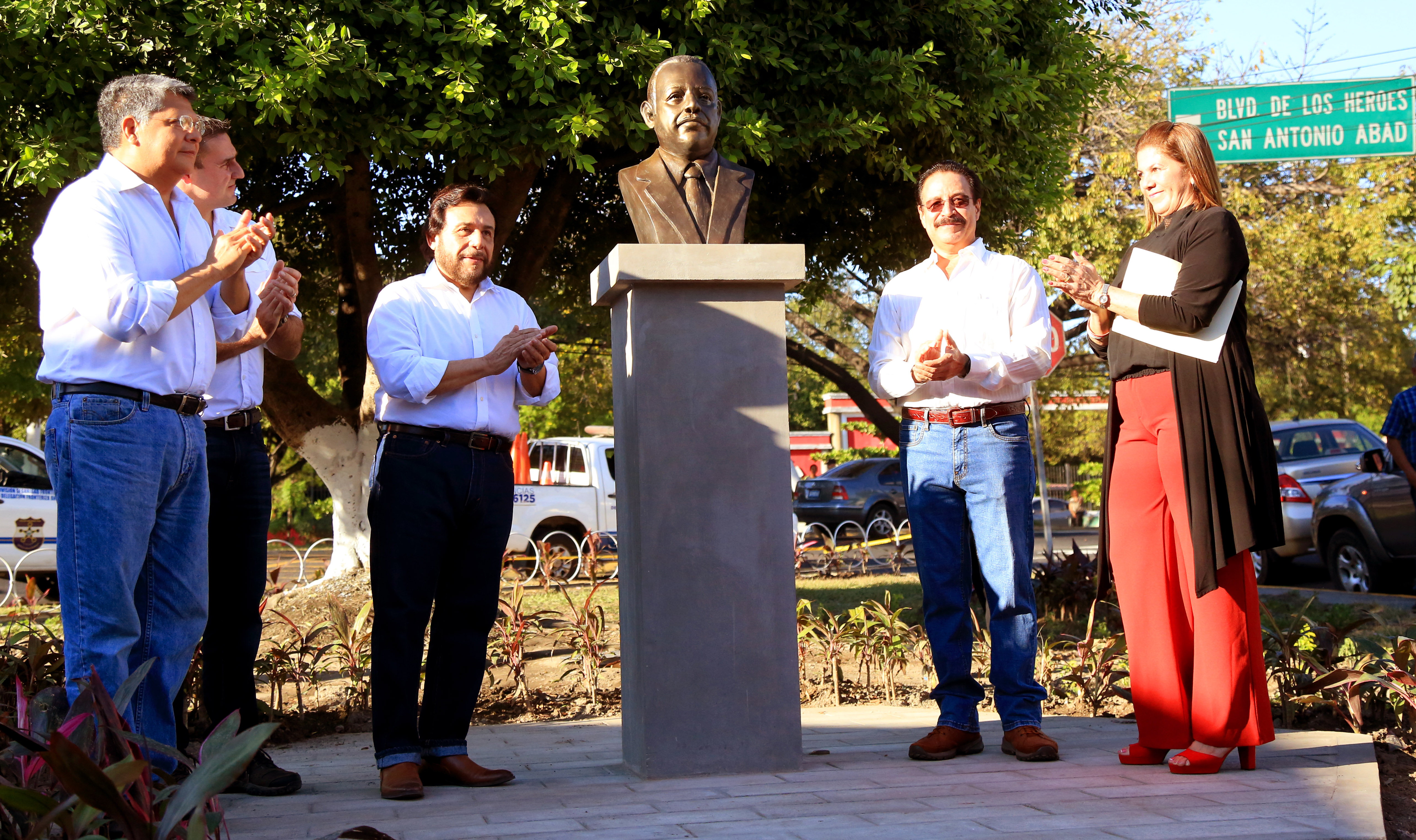 Asisten: Carlos Rivas Zamora, Ernesto Muyshondt, Alcalde de San Salvador, sus hijos el Vicepresidente de la República de El Salvador, Dr. Félix Ulloa hijo, Dr. Oscar Mauricio Ulloa; y representante de sector profesional de la UES.